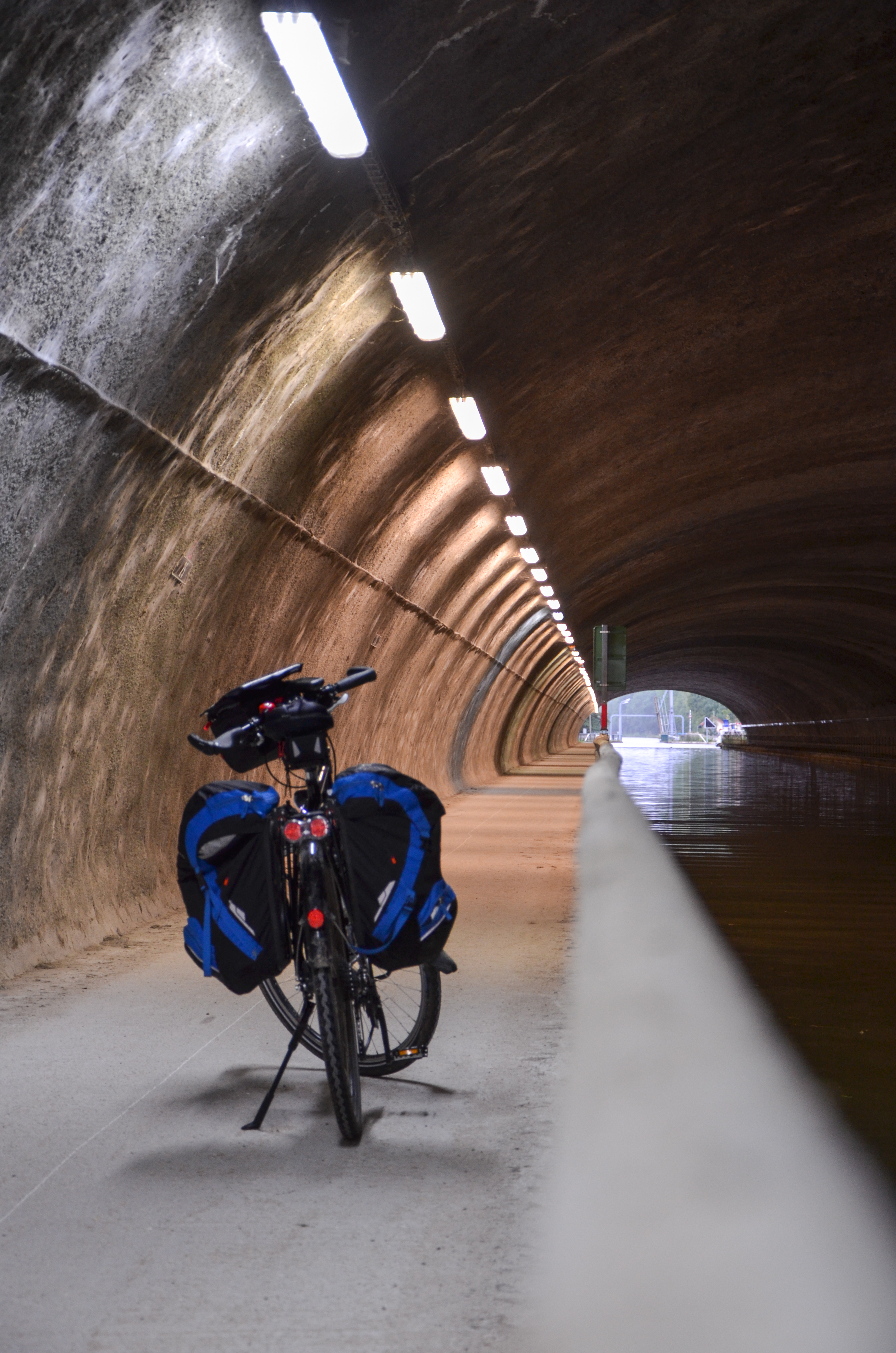 Tunnel de Condes sur le canal de la Marne à la Saone, Haute-Marne, Champagne-Ardennes, France